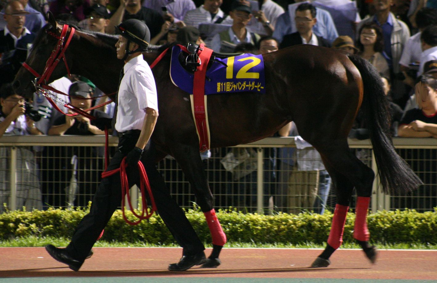 ゴールデンチケット